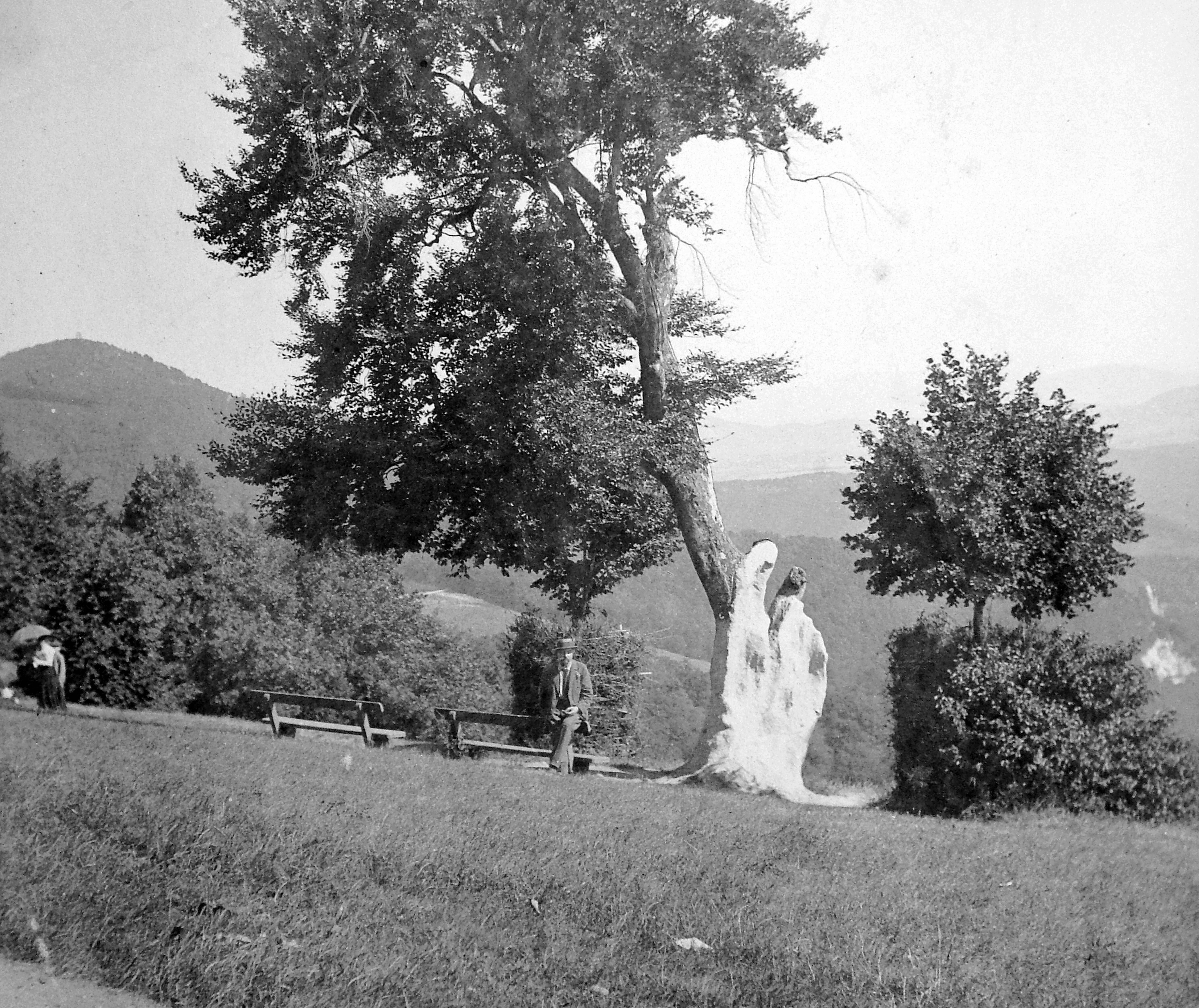 A normafa 1918-ban. A fát többször is villámcsapás érte, és 1927. június 19-én egy villám végleg elpusztította.